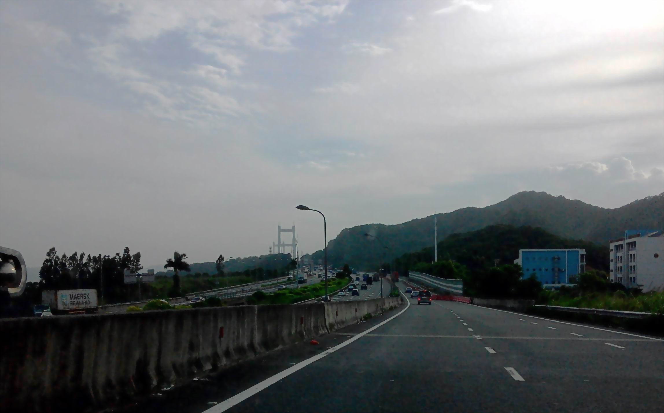 中国高速G9411 虎门大桥 佛山方向